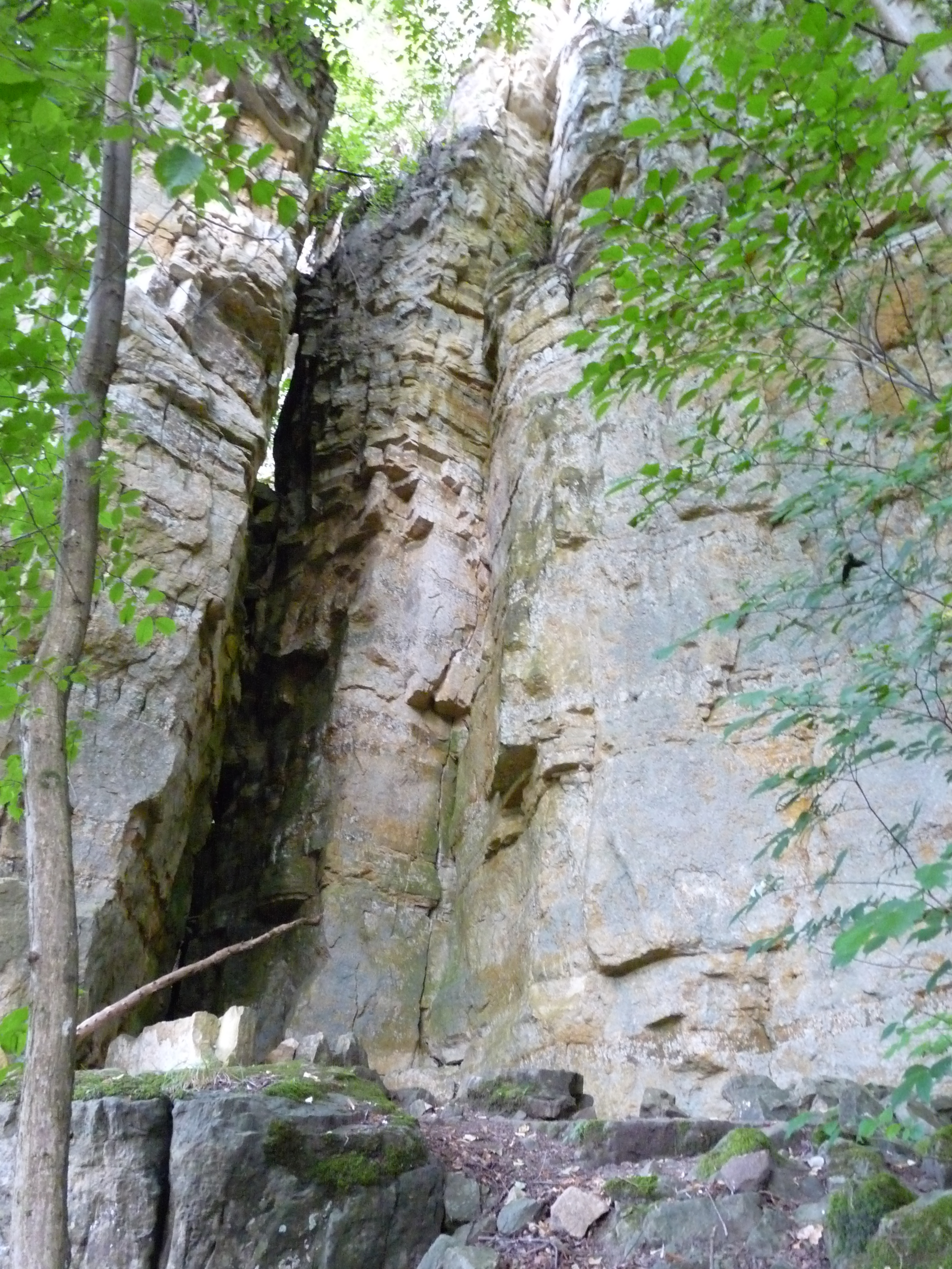 Skály a příroda v okolí Echernachu - malé lucemburské Švýcarsko